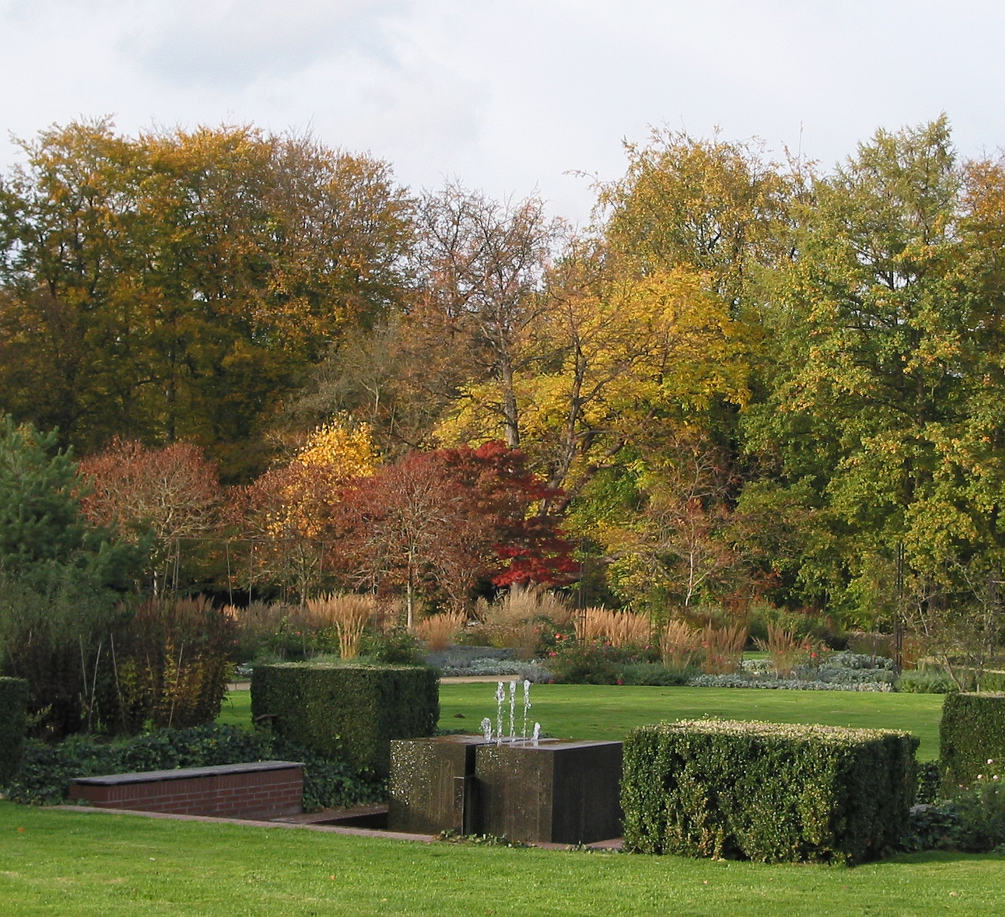 Blick in den Botanischen Garten der Stadt Gütersloh.